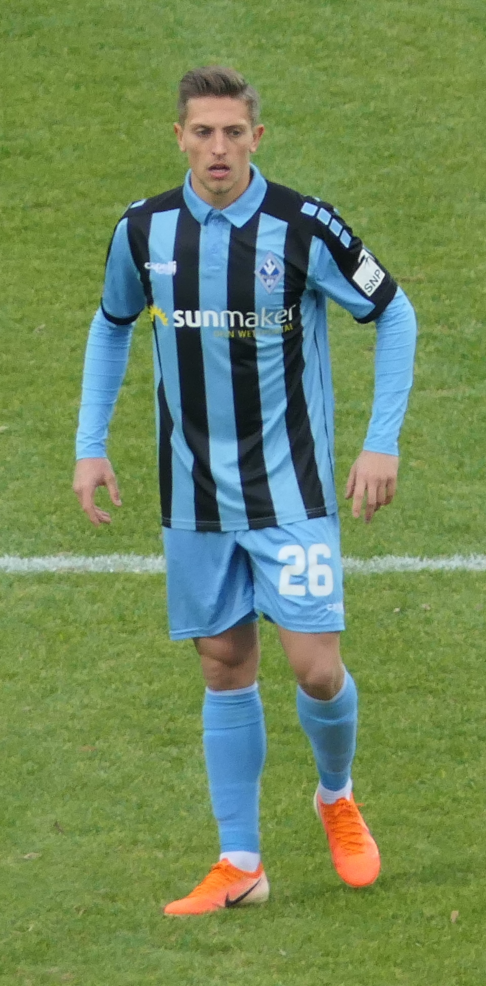 Der Fussballprofi Jan-Hendrik Marx im Trikot vom SV Waldhof Mannheim beim Heimspiel gegen Eintracht Braunschweig am 08.12.2019.